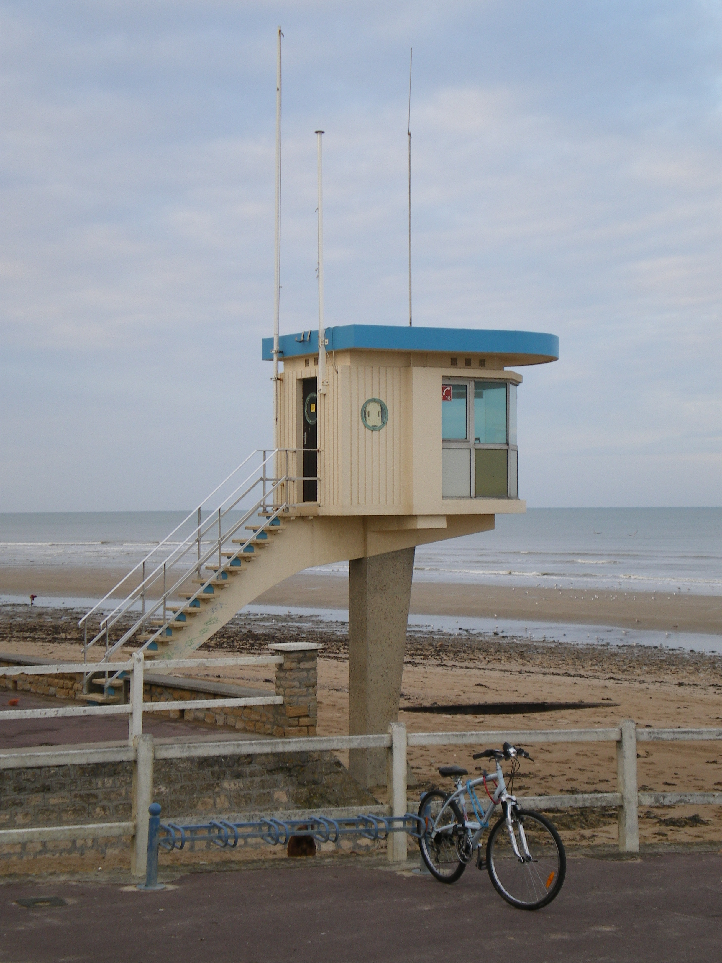 Poste de secours d'Hermanville-sur-Mer, dans le Calvados (France)